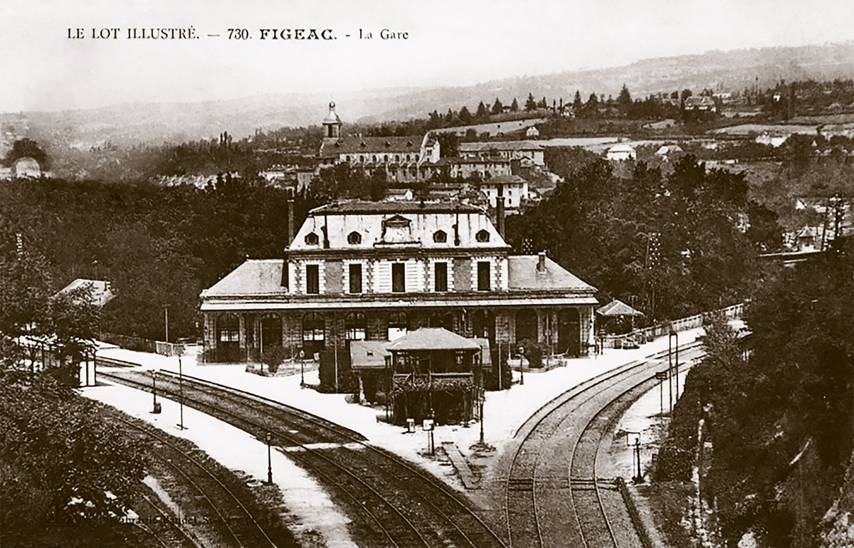 Carte postale de la gare de Figeac vers 1890